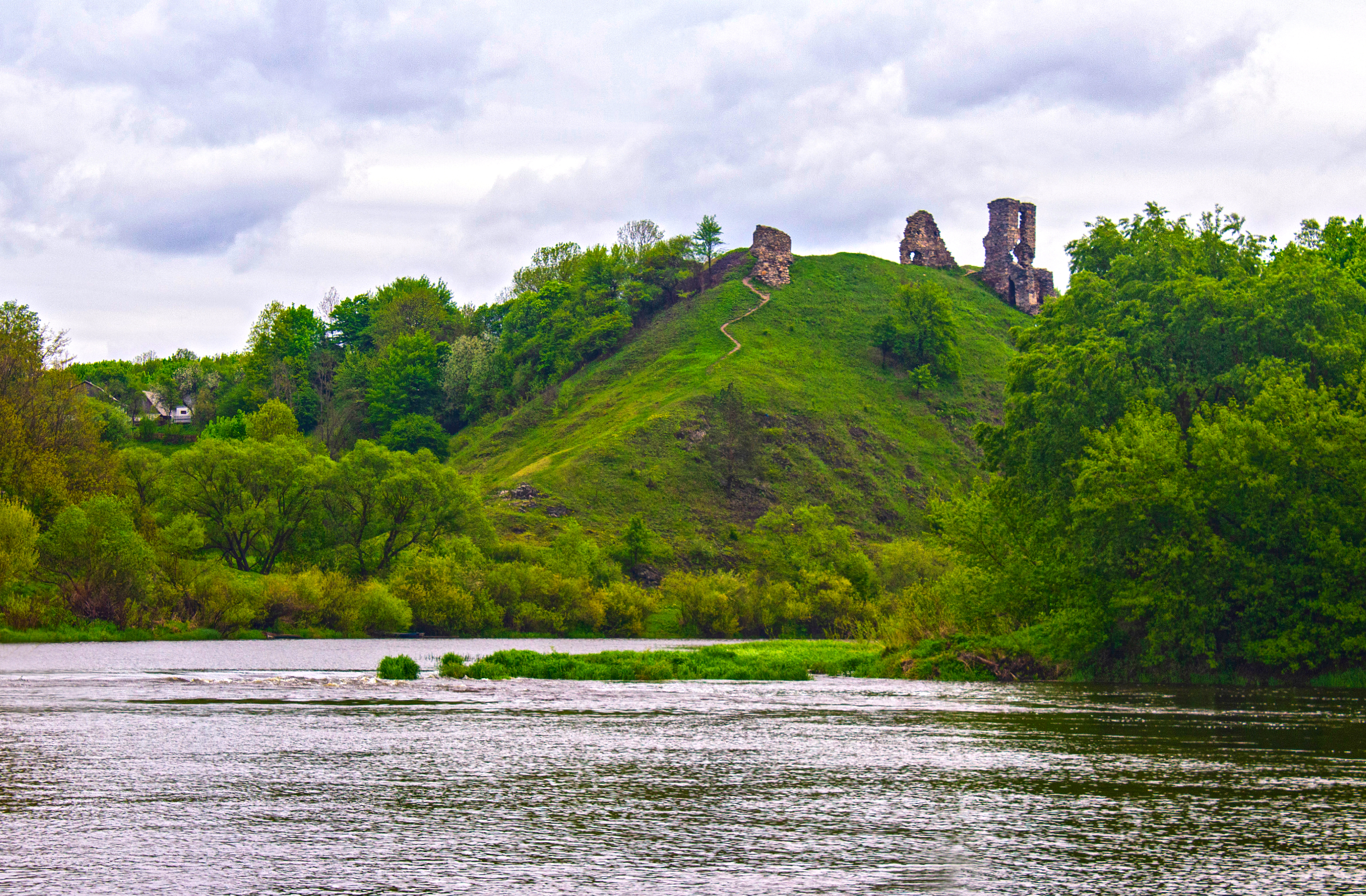 Руїни замку (мур.), с.Губків